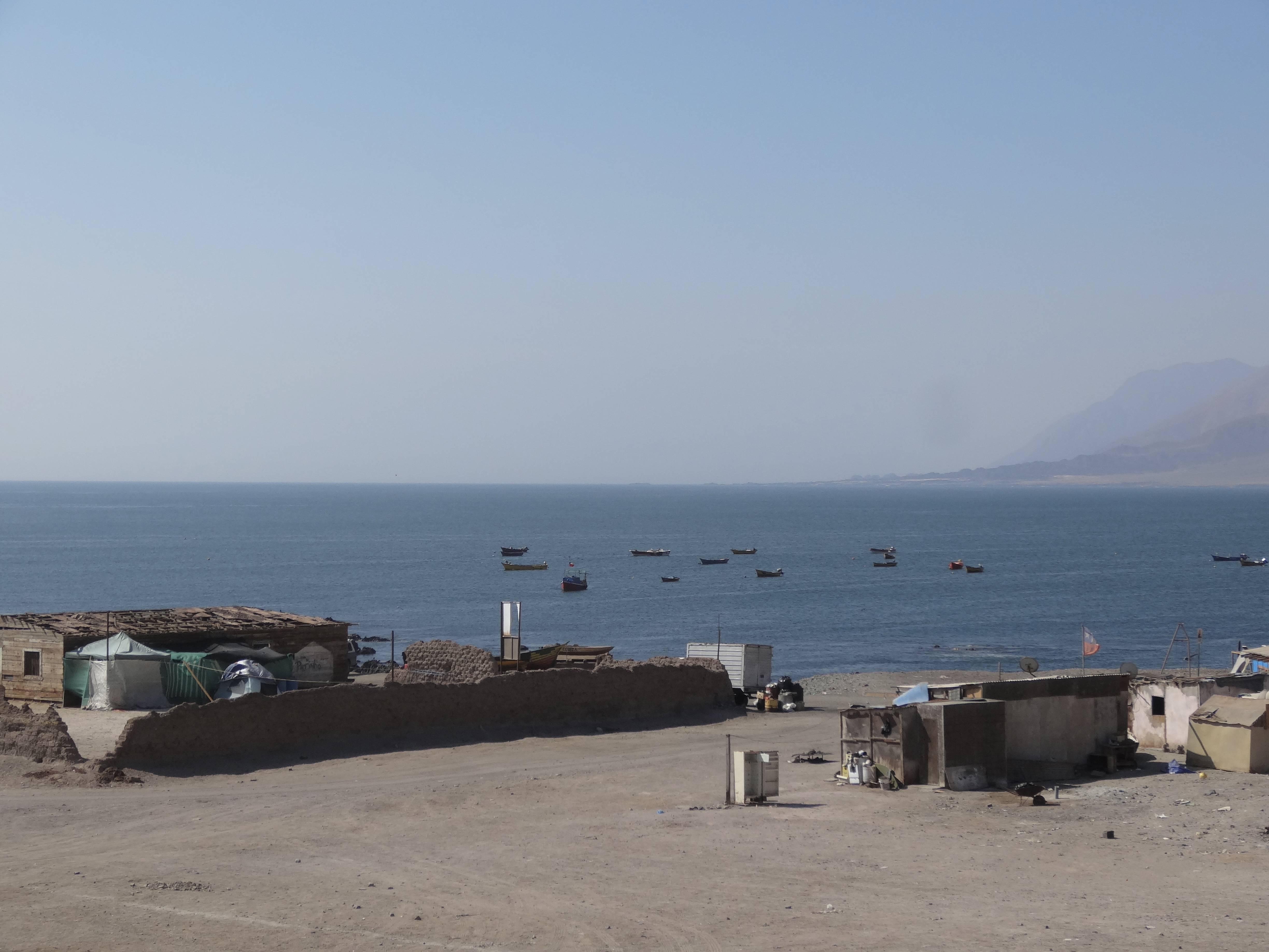 Poblado de Cobija (2014)